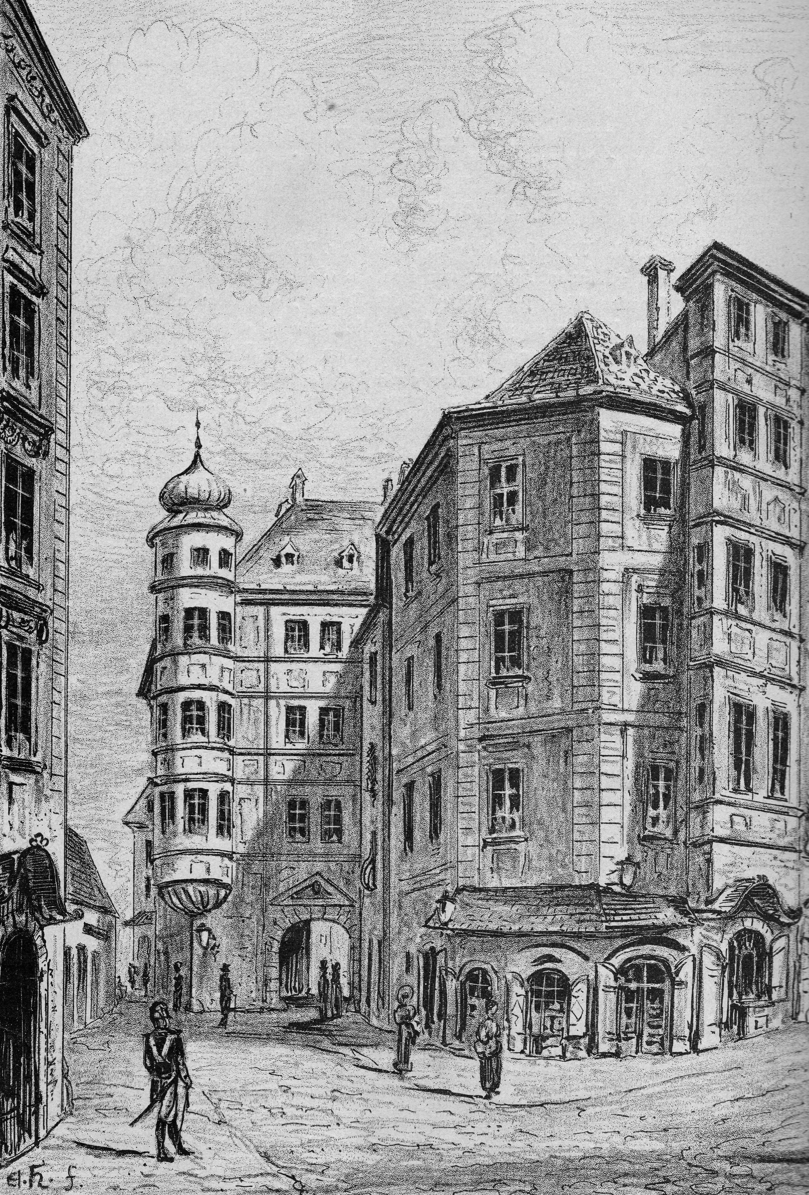 Das ehemalige Küssdenpfennig-Haus in Wien, 1878 abgerissen